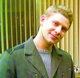 Hi-Fi